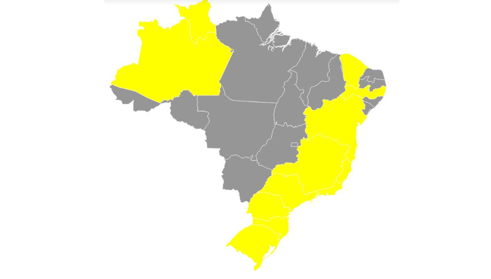 Português do Brasil: Imagem dos estados de ocorrência de briófitas da família Herbertaceae no Brasil.